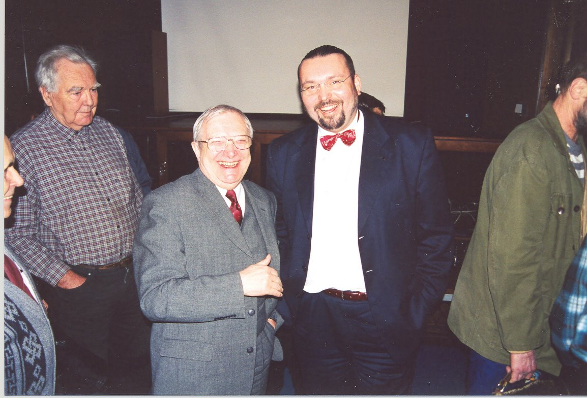 Křest CD Karel Ctibor: Pár kouzel Znát